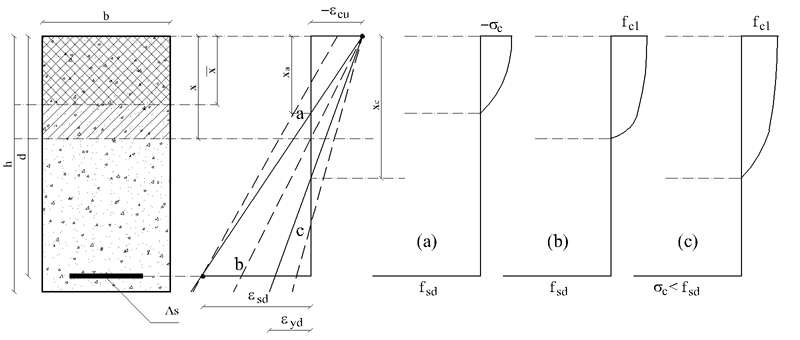 Schema grafico di sezione rettangolare (stato limite di rottura) di una trave inflessa